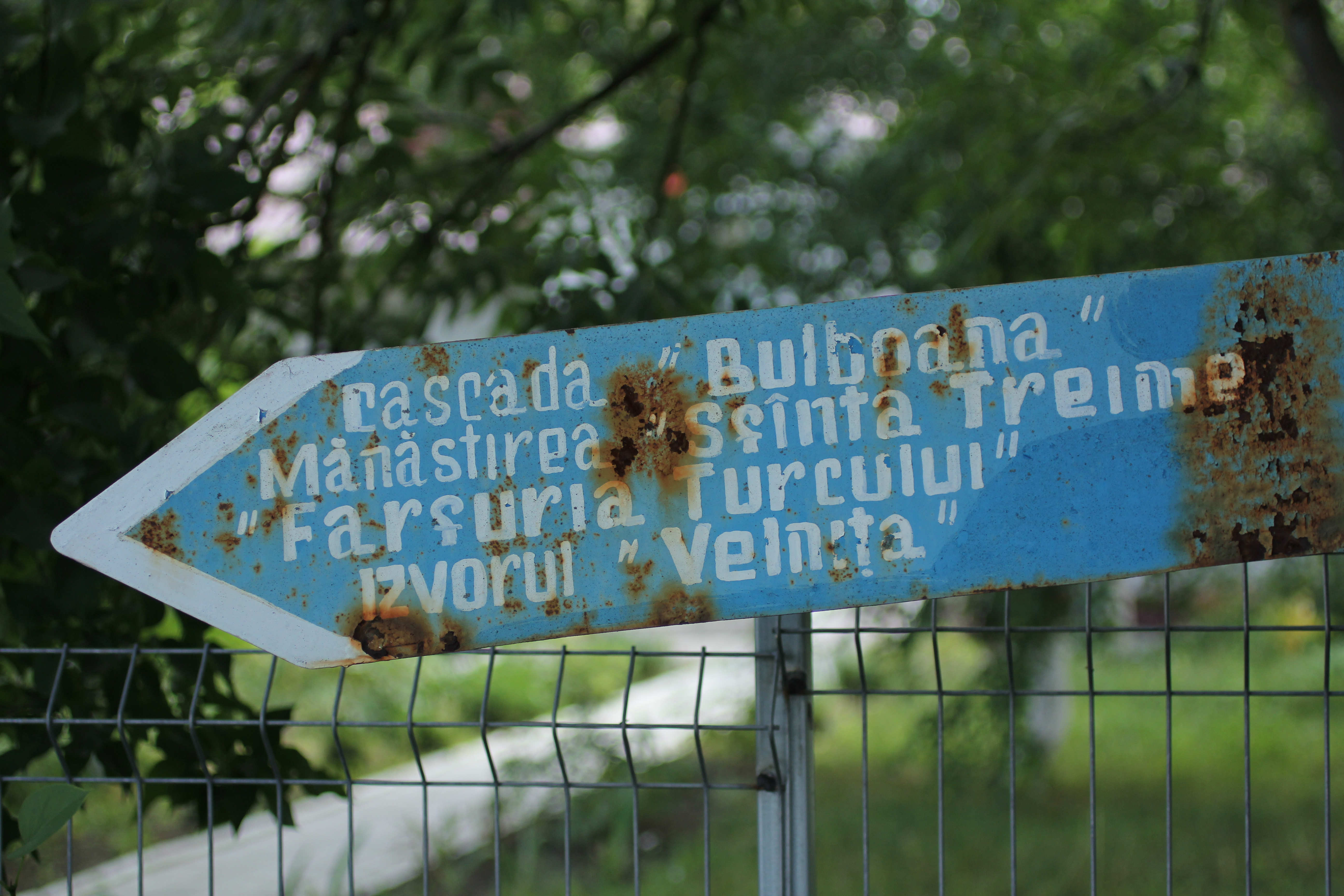 Rudi – Arionești, monument al naturii amplasat în raionul Dondușeni, la 10 km mai jos de orașul Otaci, de-a lungul Nistrului, ocolul silvic Otaci, Arionești – Stînca, parcelele 20-22; Rudi-Gavan, parcelele 23-29 (cod MD-DN-rp-017)